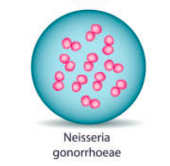 Diplocoques gram négatifs (Neisseria Meningitidis)